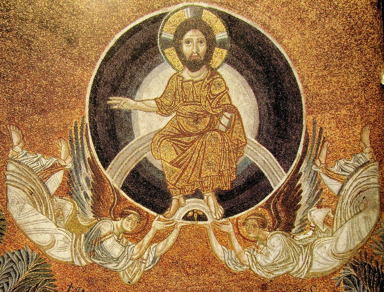 Ανάληψη στον τρούλο της Αγίας Σοφίας Θεσσαλονίκης